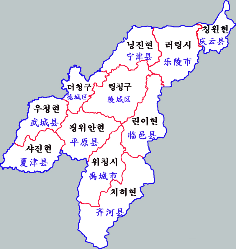 더저우시 행정구역